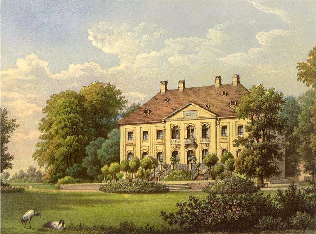 Schloss Mückenberg, Kreis Liebenwerda, Lithografie aus dem 19. Jahrhundert